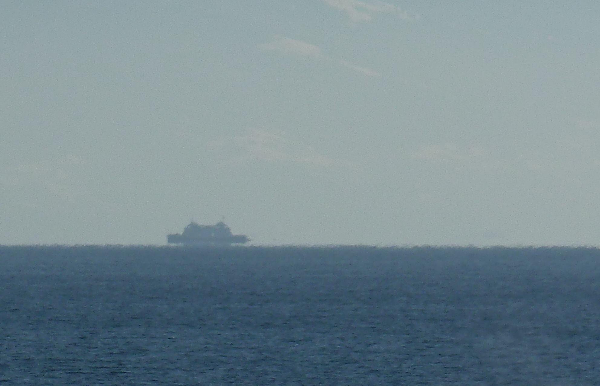 Bodenseefähre Romanshorn auf dem Kurs von Romanshorn (CH) nach Friedrichshafen (D).